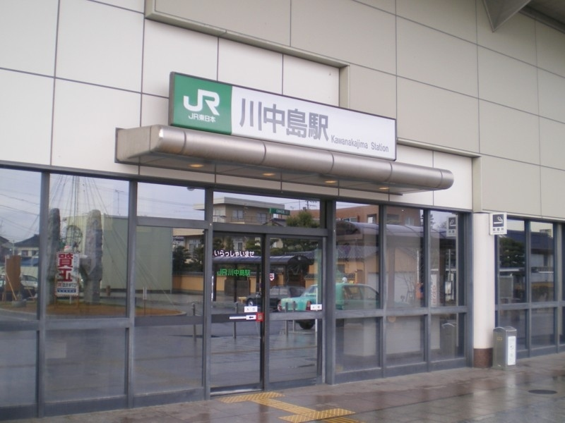 Kawanakajima station (Nagano-shi, Nagano, Japan)